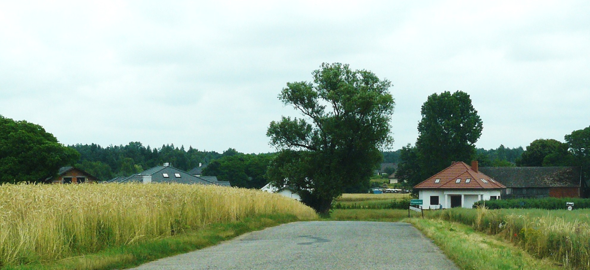 Widok ogólny Promienka z zachodu.